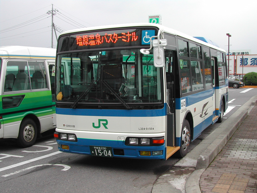 西那須野駅前にて撮影